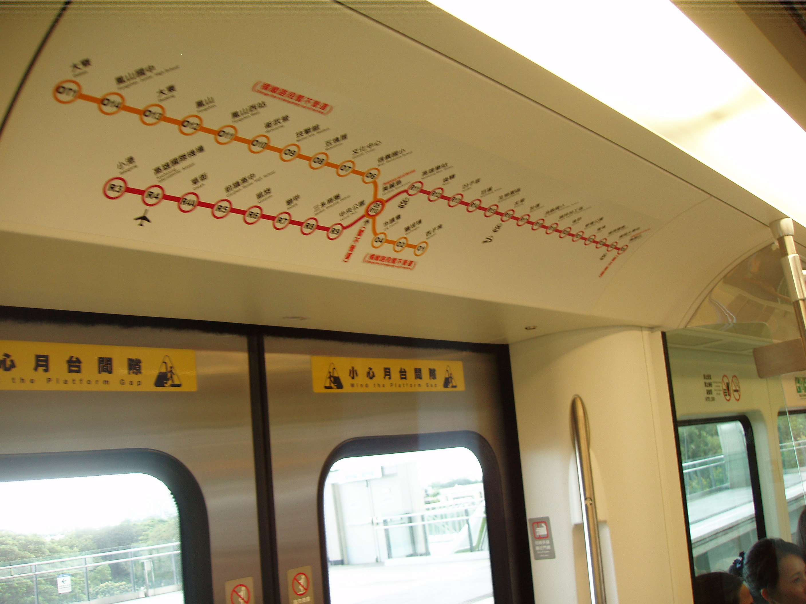 中文（台灣）: 高雄捷運紅線列車車內路線圖。